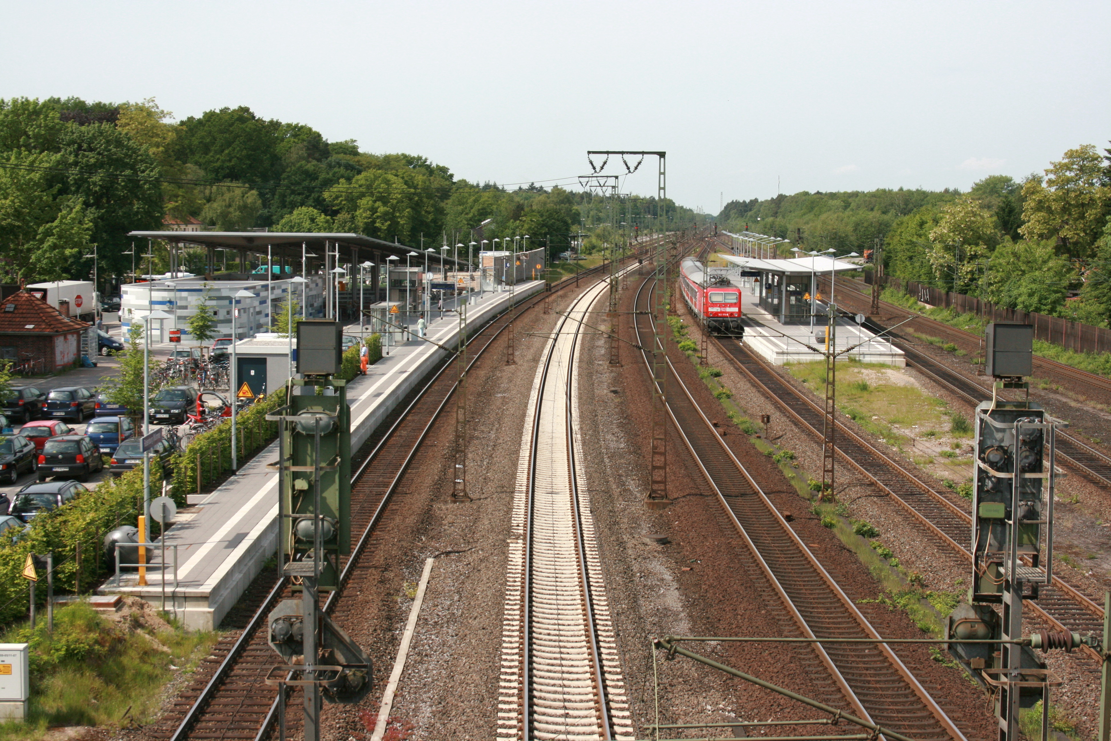 Bahnhof in Rotenburg (Wümme)